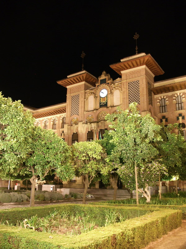 Rectorado de la Universidad de Córdoba (España) y antigua Facultad de Veterinaria.